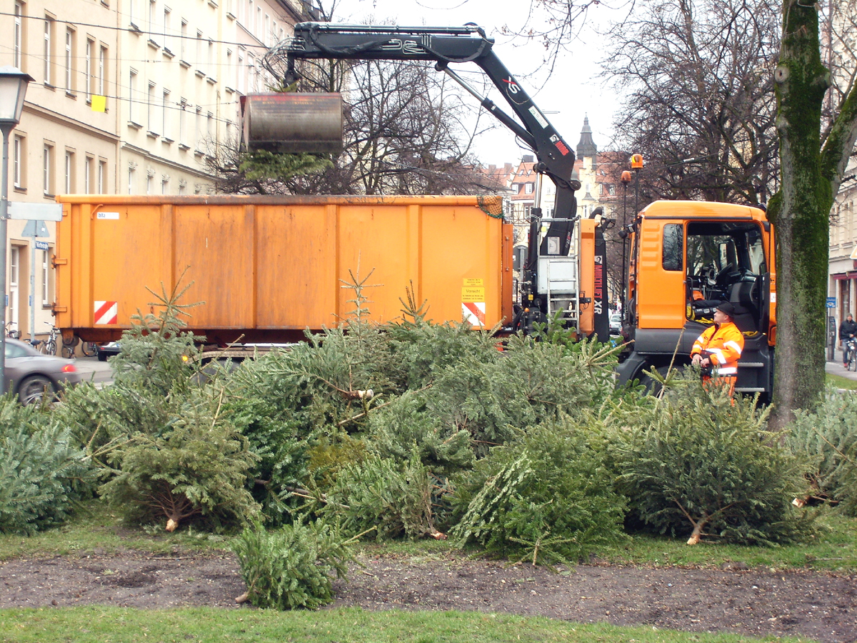 Traditionsgemäß werden in München-Haidhausen in der ersten Januarwoche Christbäume für den Tierpark Hellabrunn als Tiernahrung gesammelt und abgeholt.